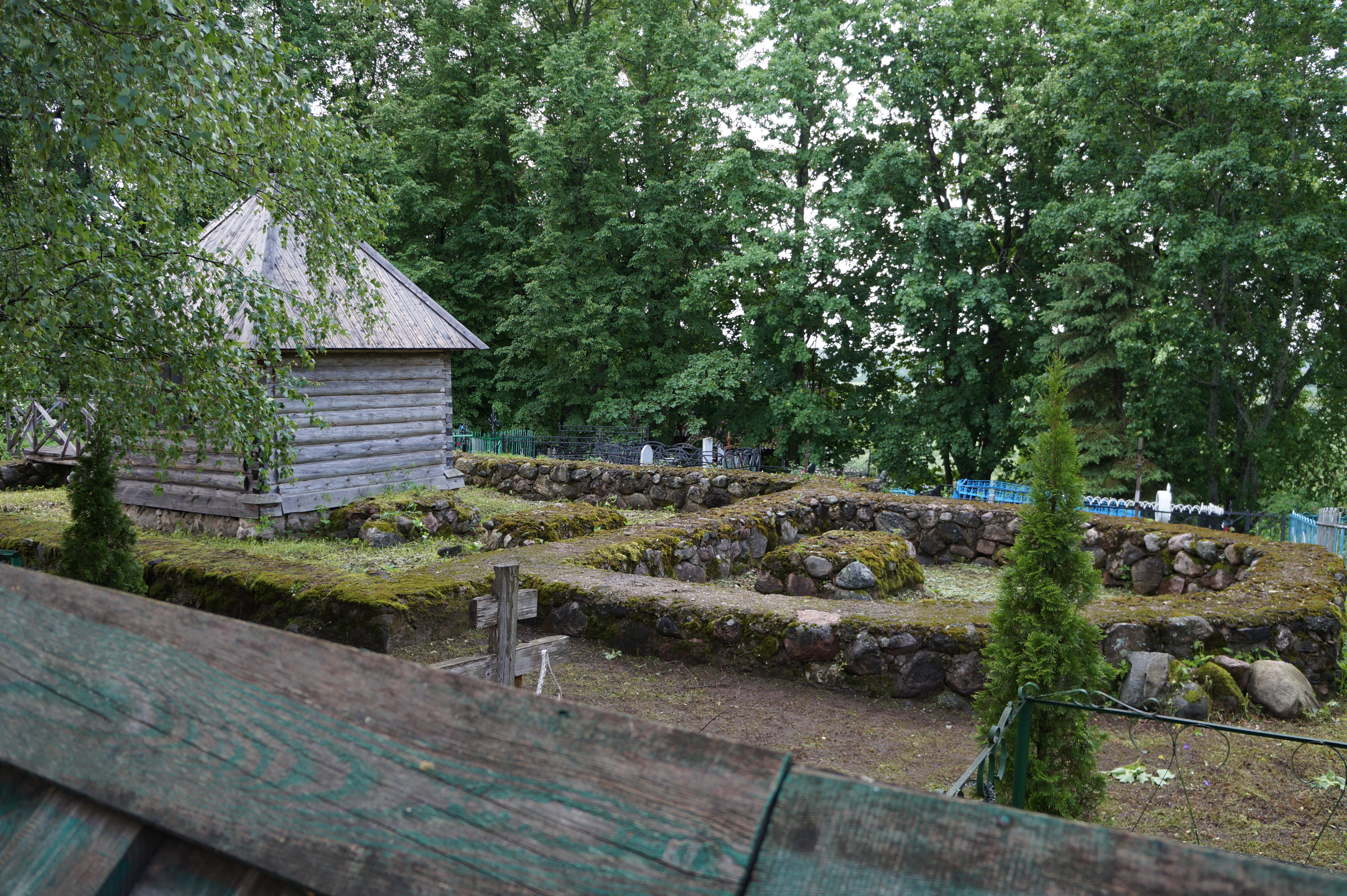 Городище Воронич. Дом священника (Псковская область, Опочка, деревня Воронич, 1)